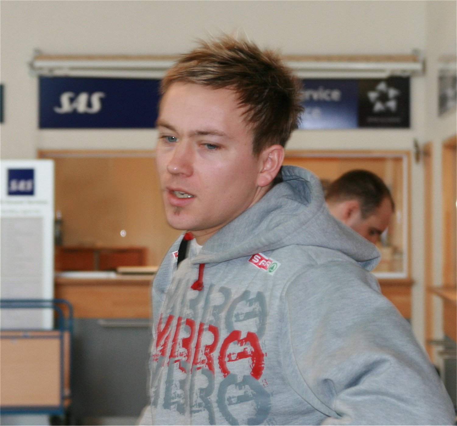 Håvard Tvedten Handball player